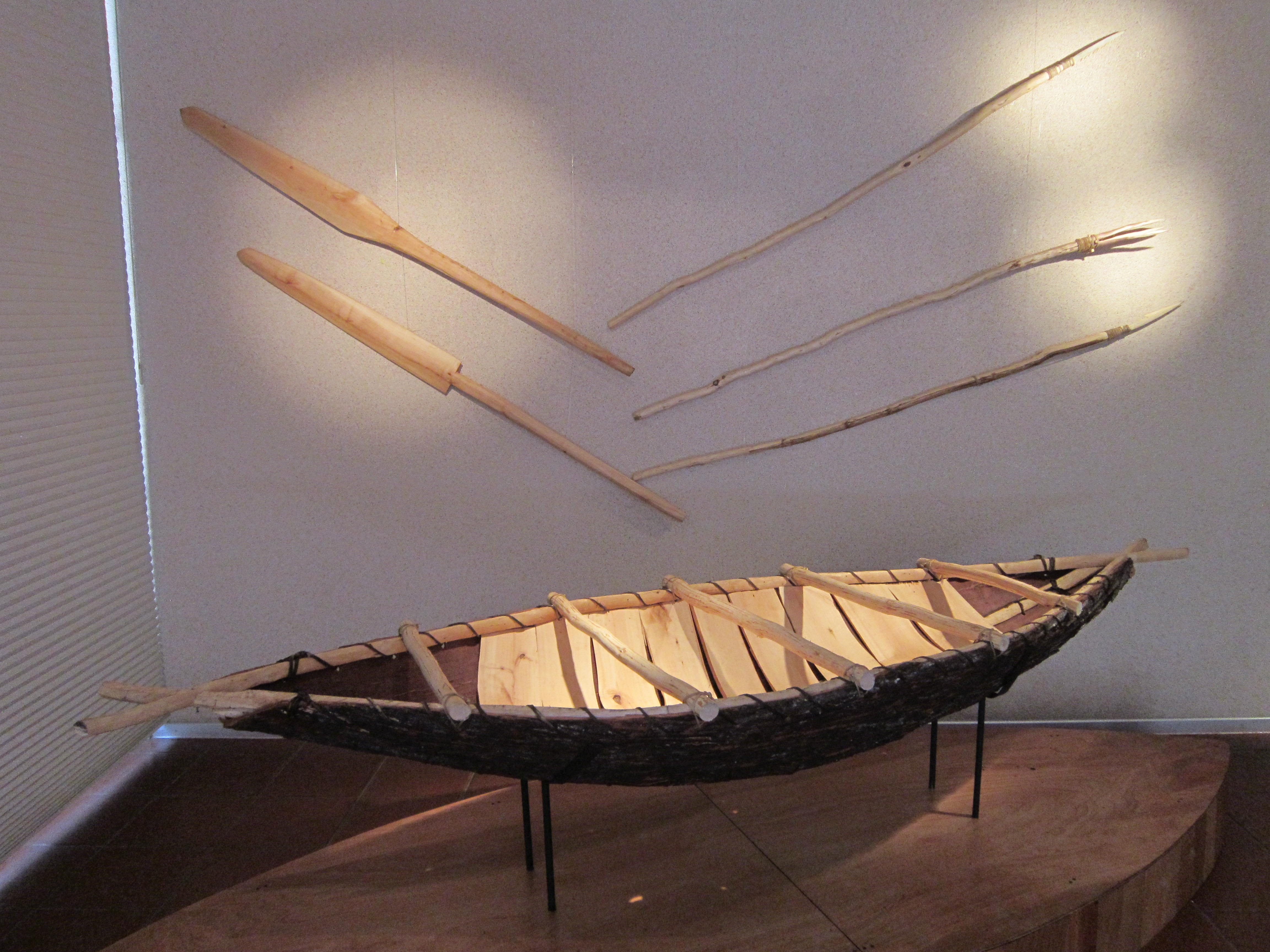 Canoa Yagana o "Anan" exhibida en el museo de Gabriela Mistral de Vicuña, en febrero de 2014